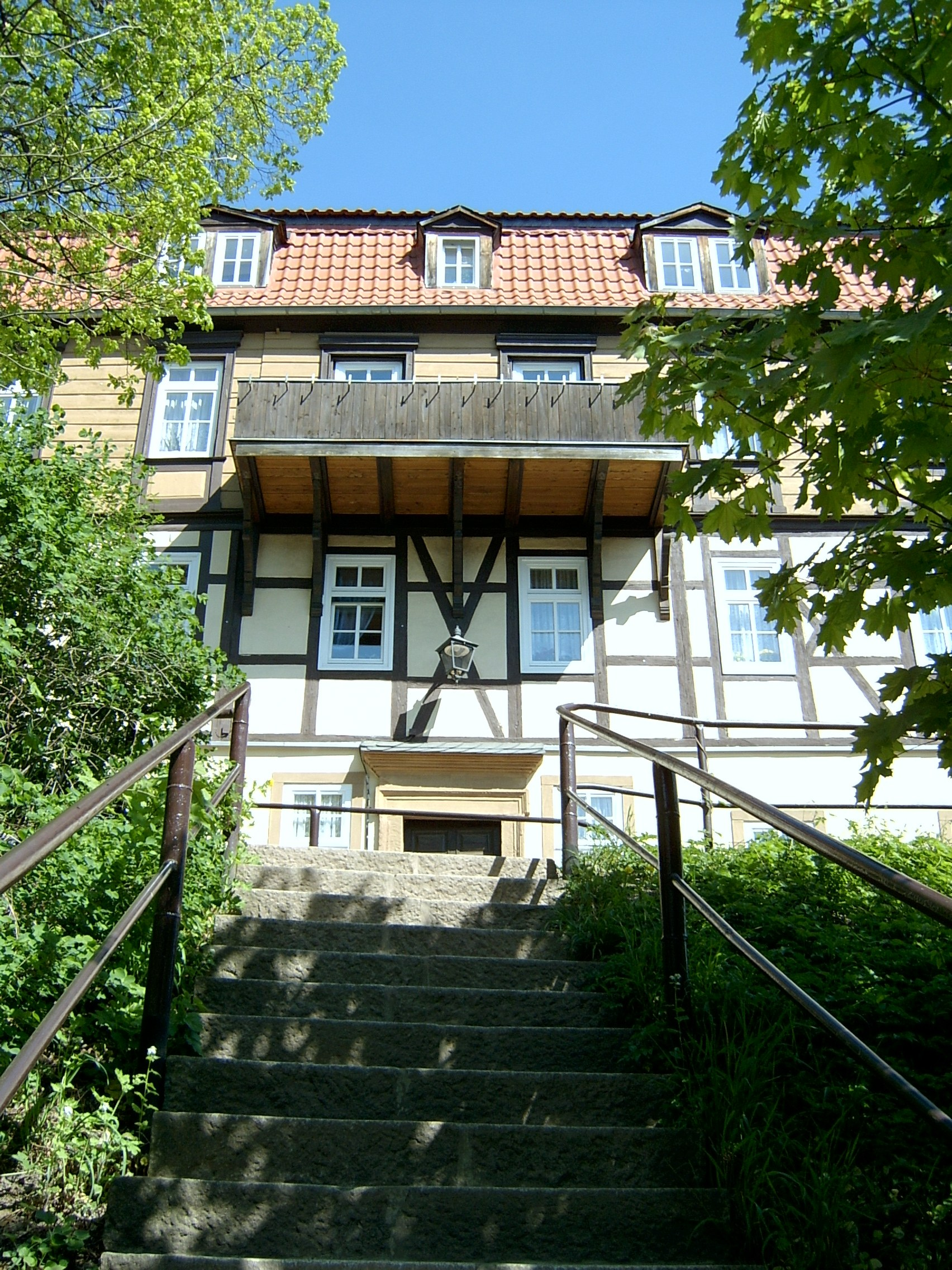 Wohnhaus von Johann Gottfried Schnabel (Gisander) in Stolberg (Harz).